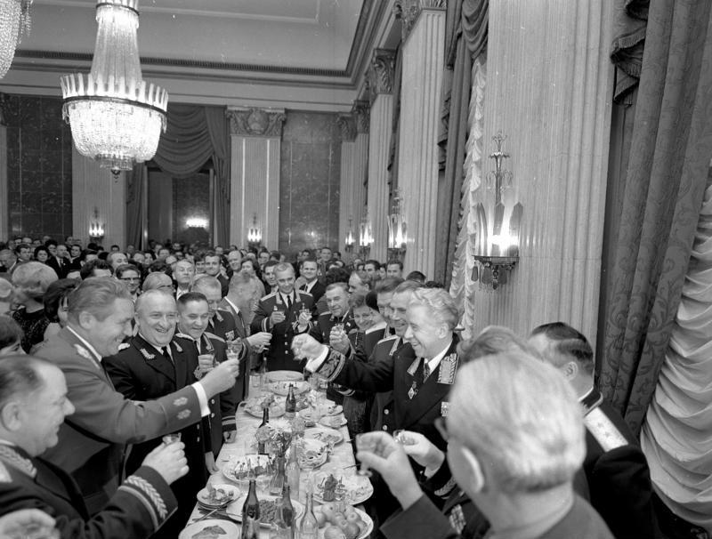 Berlin, Sowjetische Botschaft, Empfang Zentralbild/Spremberg 8.11.1967 50 Jahre Sowjetmacht Berlin: Festlicher Empfang zum 50. Jahrestag der Großen Sozialistischen Oktoberrevolution in der sowjetischen Botschaft Unter den Linden Ein Toast auf die deutsch-sowjetische Waffenbrüderschaft! Armeegeneral P. Koschewoj, Oberkommandierender der zeitweilig in der DDR stationierten sowjetischen Streitkräfte (vorn. links), Armeegeneral Heinz Hoffmann, Minister für Nationale Verteidigung der DDR (2.v.l.); Admiral Waldemar Werner, Chef der Politischen Hauptverwaltung der NVA und Stellvertreter des Ministers für Nationale Verteidigung (dahinter) Botschafter P.A. Abrassimow (rechts) und hohe Offiziere auf dem festlichen Empfang zum 50. Jahrtestag der Großen Sozalistischen Oktoberrevolution am Abend des 7. Nov. 1967 in der sowjetischen Botschaft Unter den Linden Abgebildete Personen: Koschewoi, Pjotr K.: Marschall, Oberkommandierender der Gruppe der sowjetischen Streitkräfte in Deutschland (GSSD), Sowjetunion Hoffmann, Heinz: Minister für Nationale Verteidigung, Mitglied des ZK der SED, DDR Abrassimow, Pjotr Andrejewitsch: Botschafter in der DDR, Mitglied des ZK der KP, Sowjetunion Verner, Waldemar: Stellvertretender Minister für Verteidigung, Vizeadmiral, Chef der Politischen Hauptverwaltung der NVA, Zentralkomitee der SED, DDR